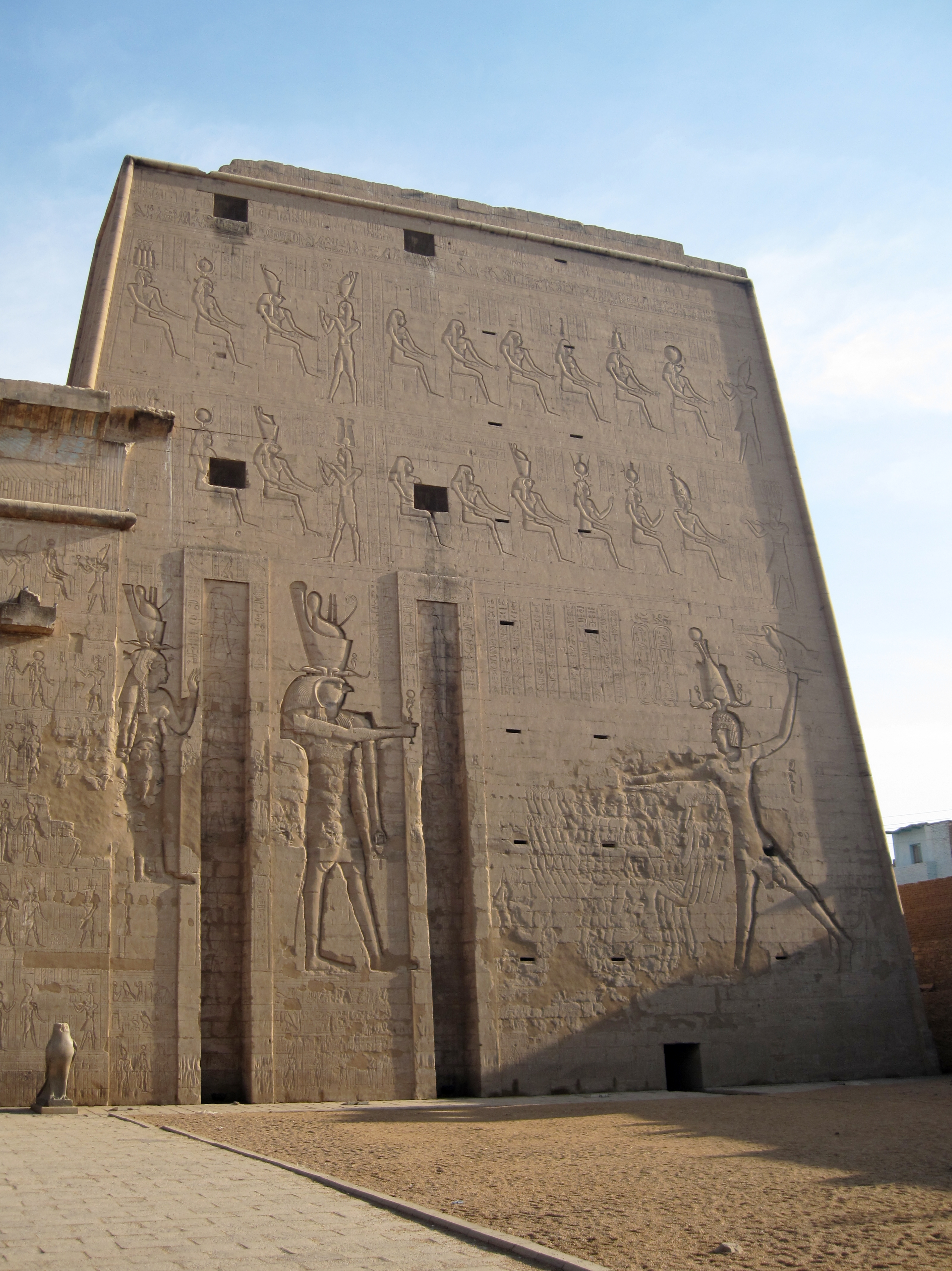 Rechter Turm des Tempelpylons von Edfu, Ägypten